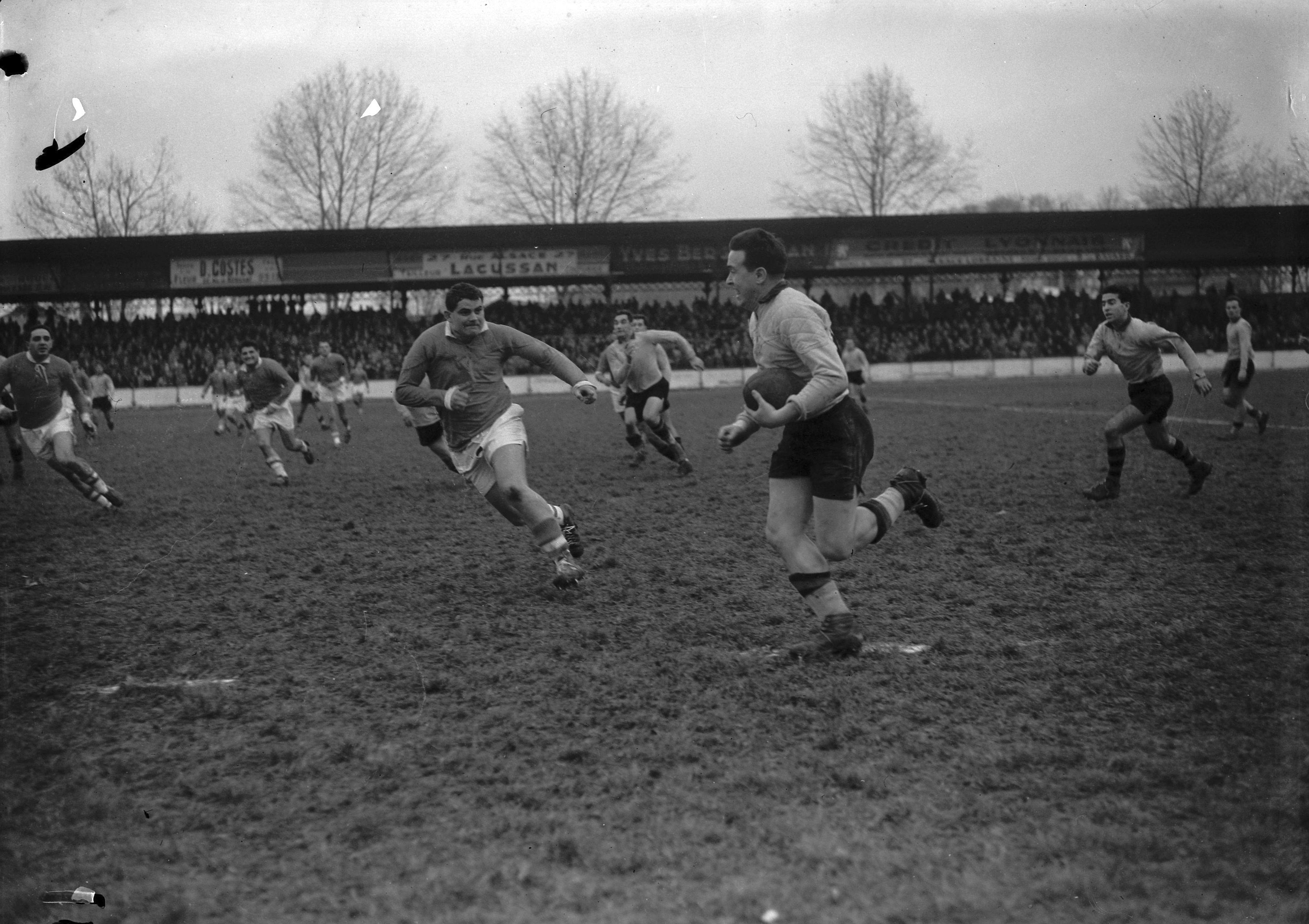 Stade Ernest Wallon. Le 29 Décembre 1957. Vue d'une phase de jeu entre le Stade Toulousain et l'équipe de Dax.